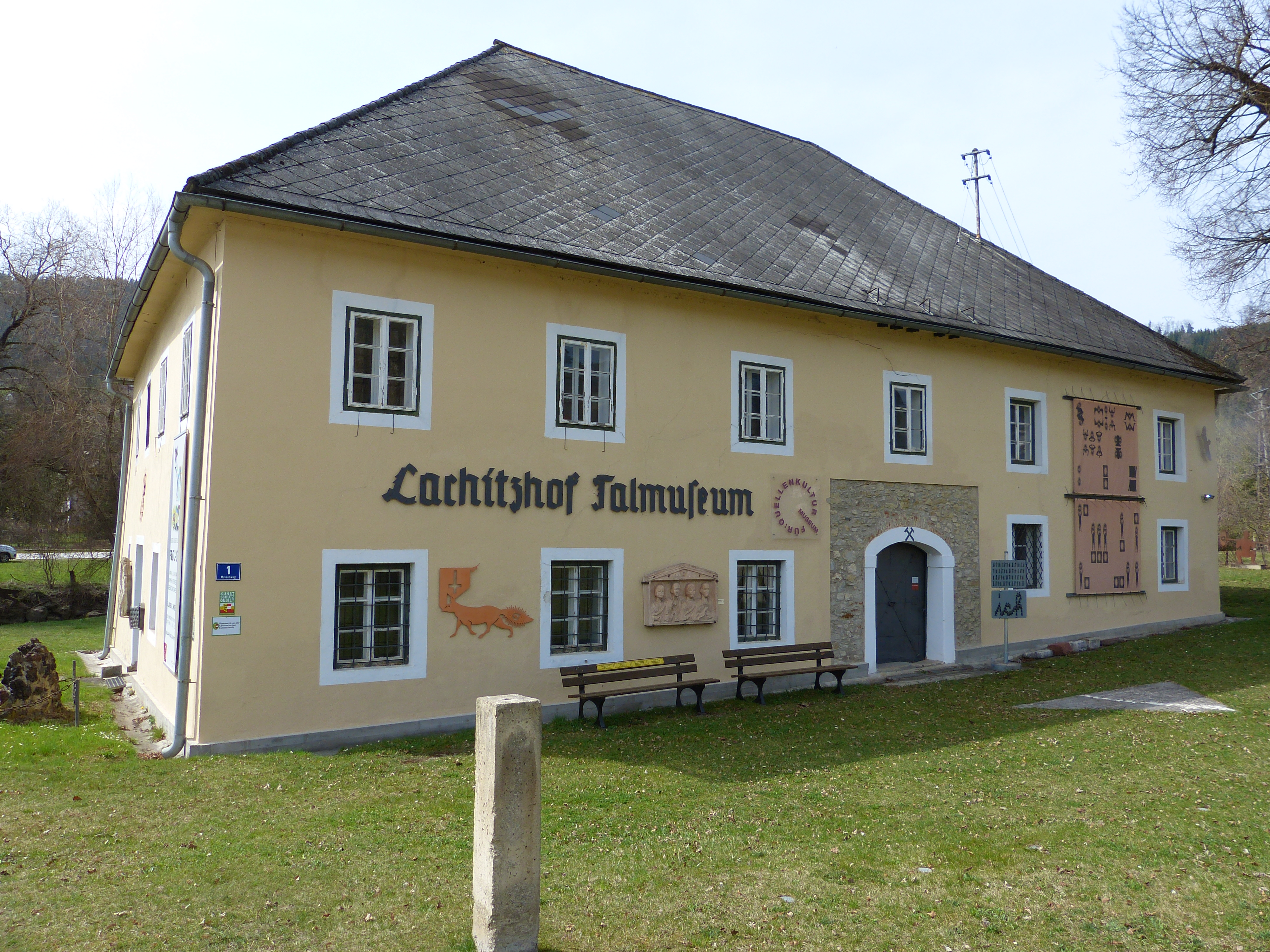 Klein Sankt Paul (Kärnten): Talmuseum Lachitzhof. denkmalgeschützter Bau. Ansicht von Südosten